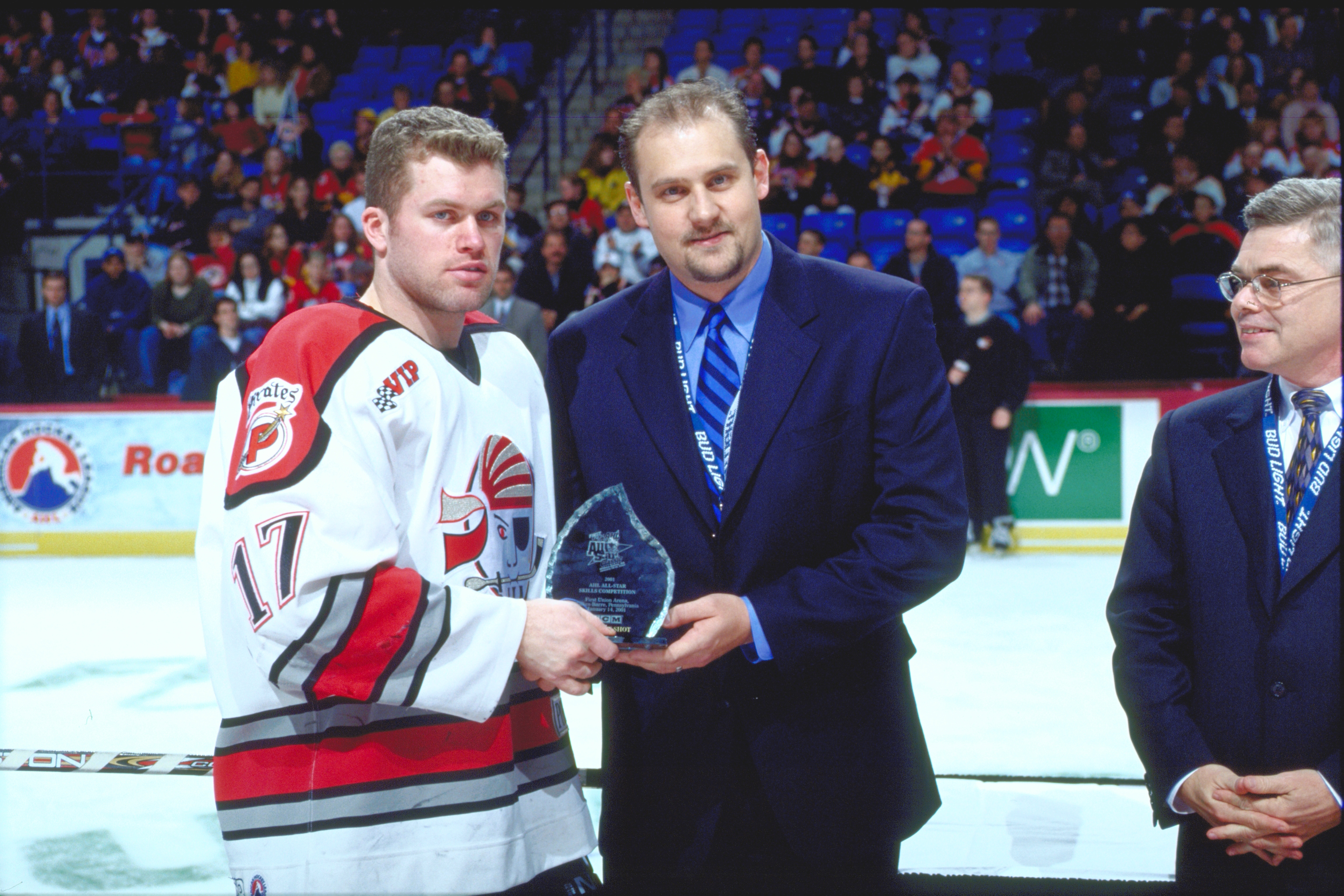 ahlstar0114